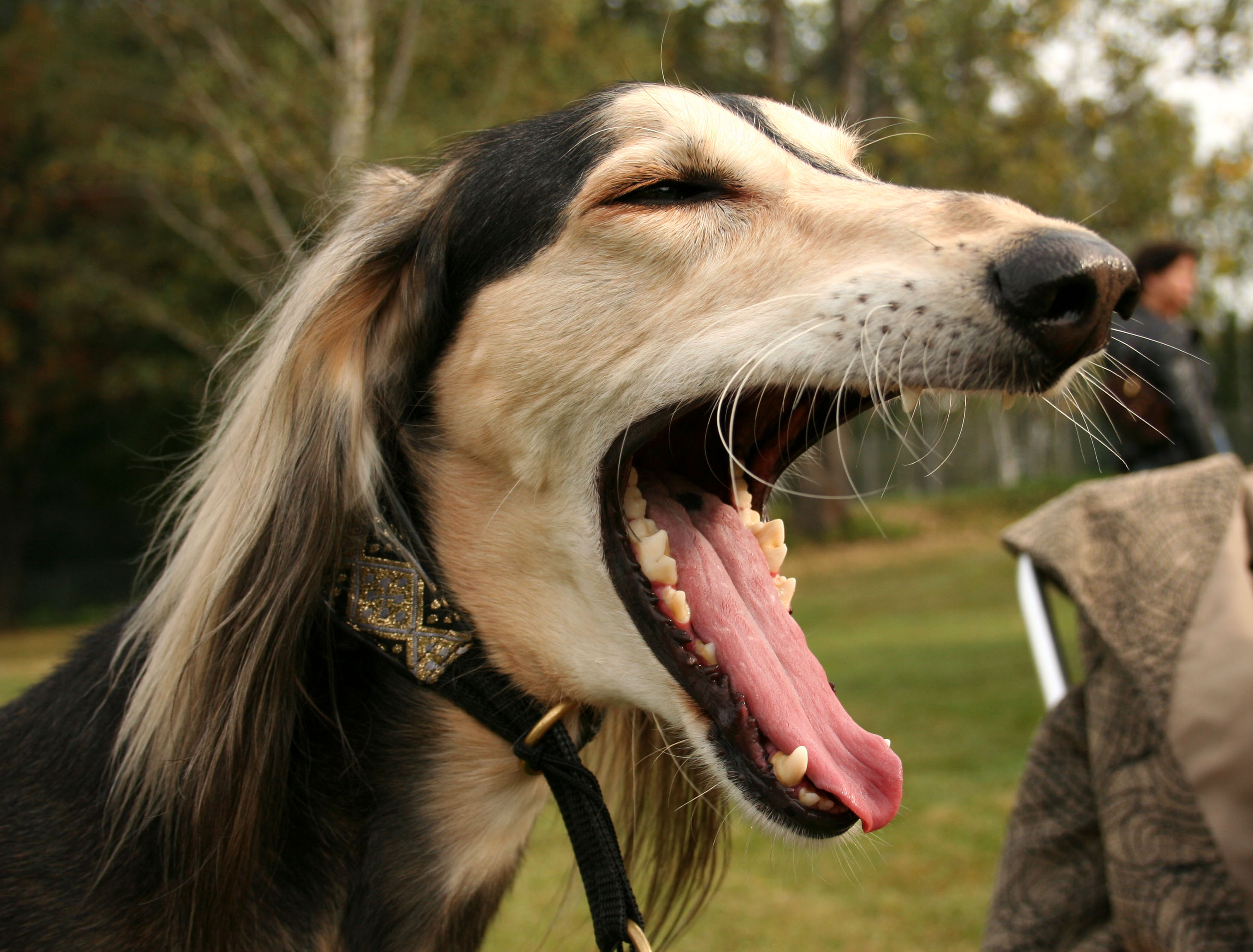 chart perski na krajowej wystawie w Rybniku - Kamieniu